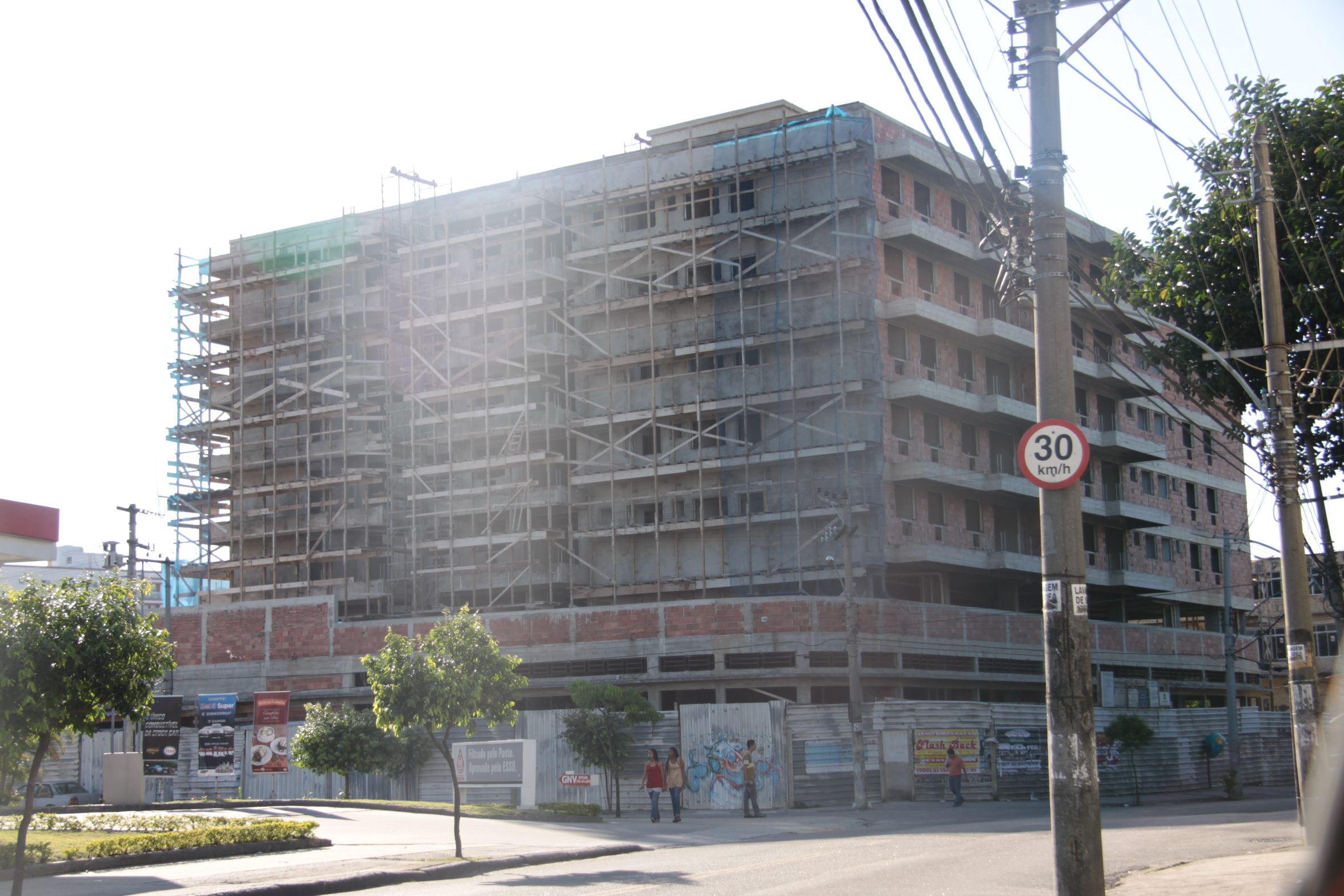 New buildin in Vila da Penha Rio de Janeiro